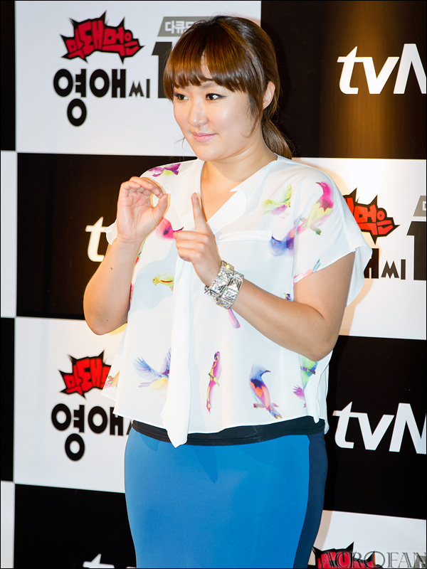 tvN 드라마 '막돼먹은 영애씨' 시즌 10 제작발표회